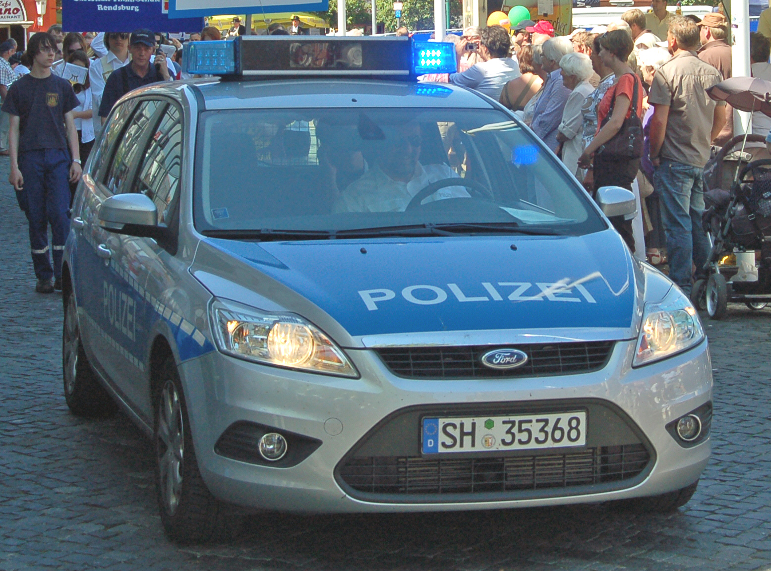 Ford der Schleswig-Holsteinischen Polizei